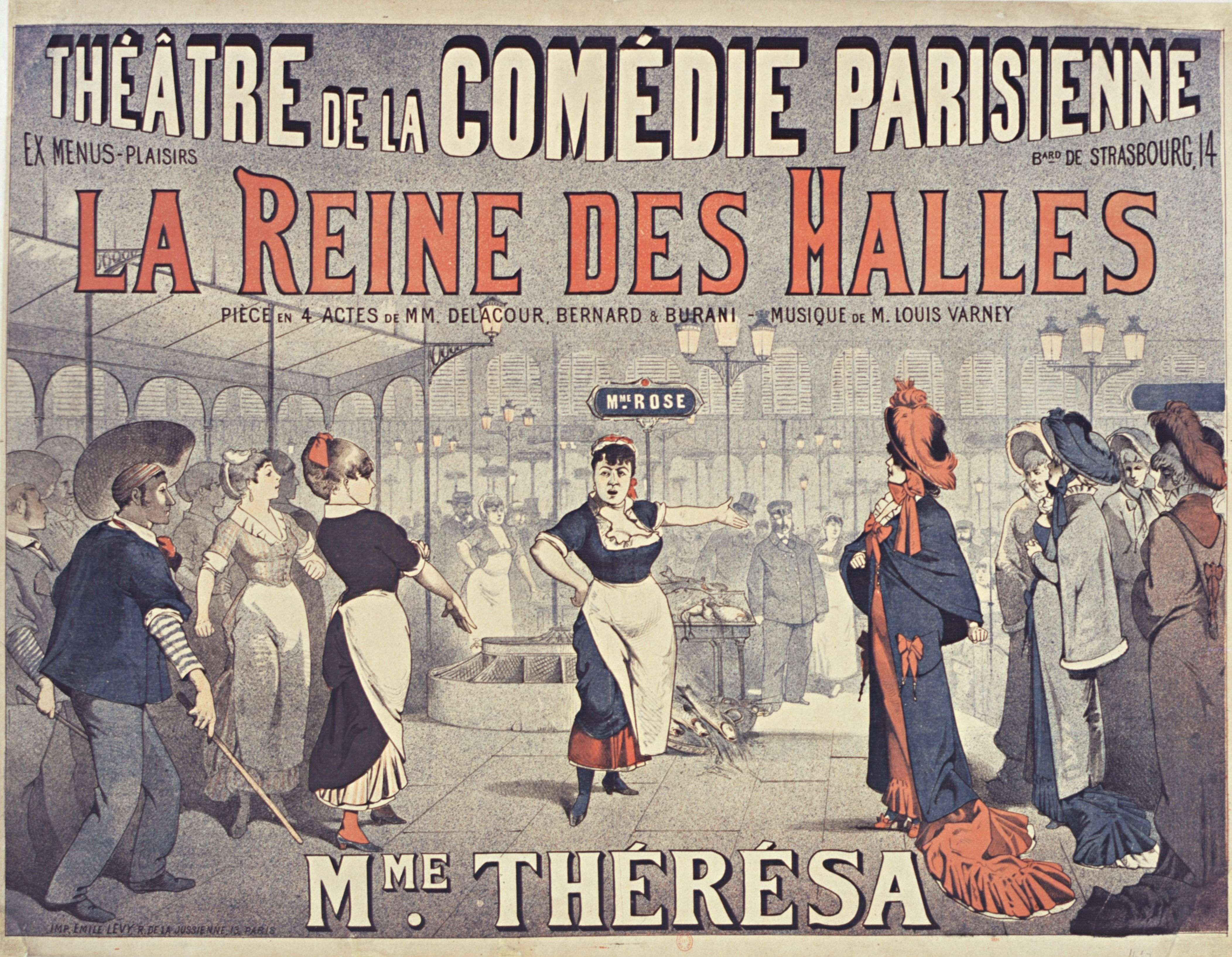 Théatre de la Comédie Parisienne, ex Menus- Plaisirs, Bd de Strasbourg, 14 : La Reine des Halles, pièce en 4 actes..., musique de M. Louis Varney : Mme Thérésa (affiche d'Emile Lévy)